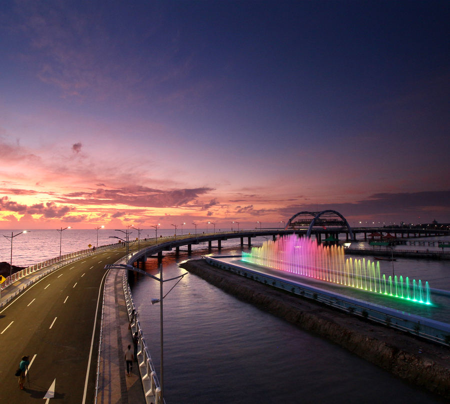 Jembatan suroboyo dusk